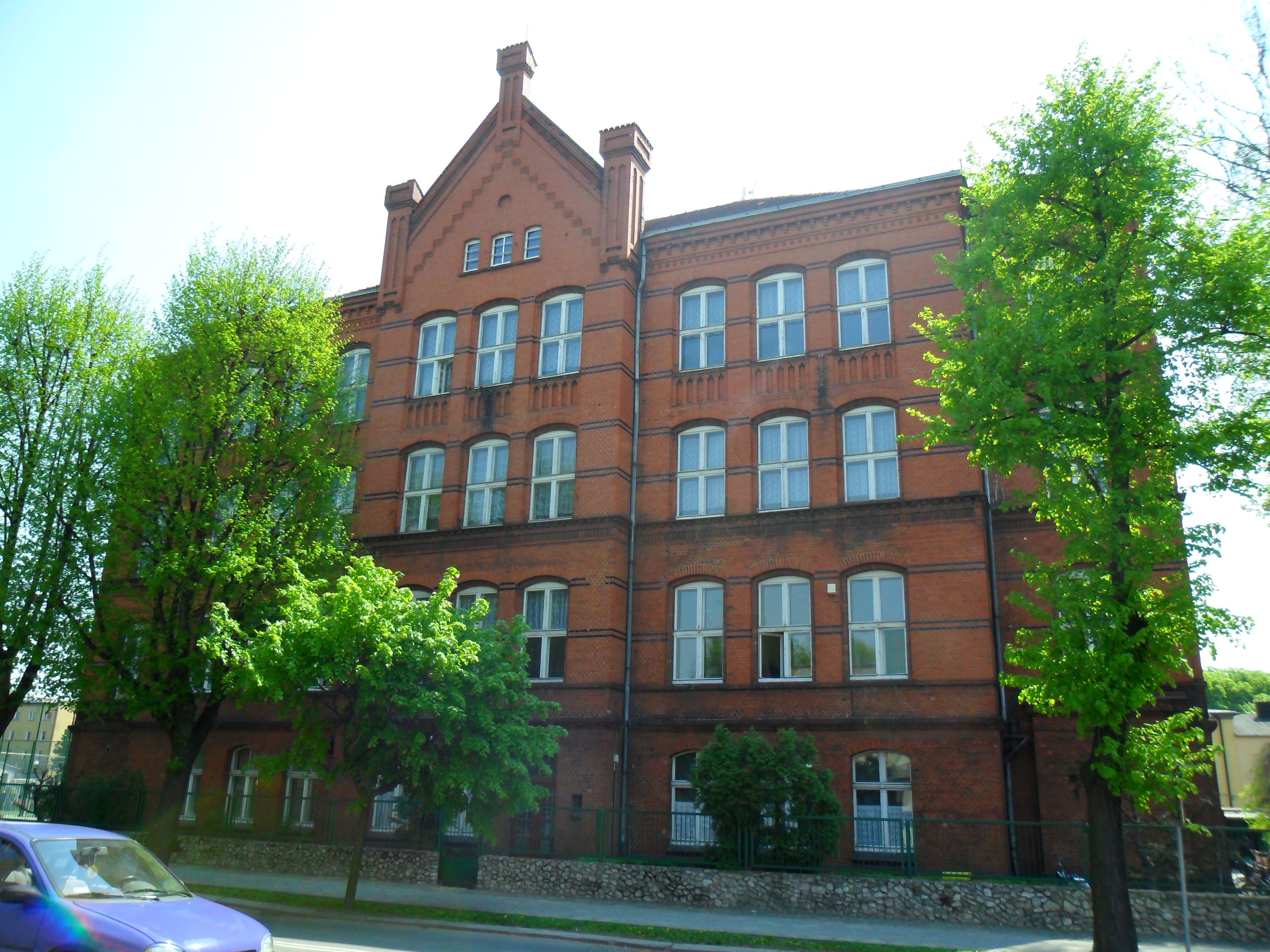 Racibórz, ul. Wileńska 8 - dawna szkoła powszechna z 1908, obecnie Zespół Szkół Zawodowych